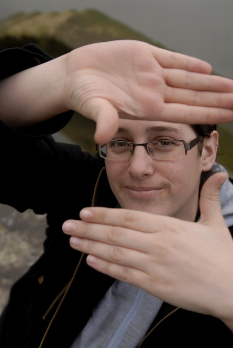 Saioa Cabañas